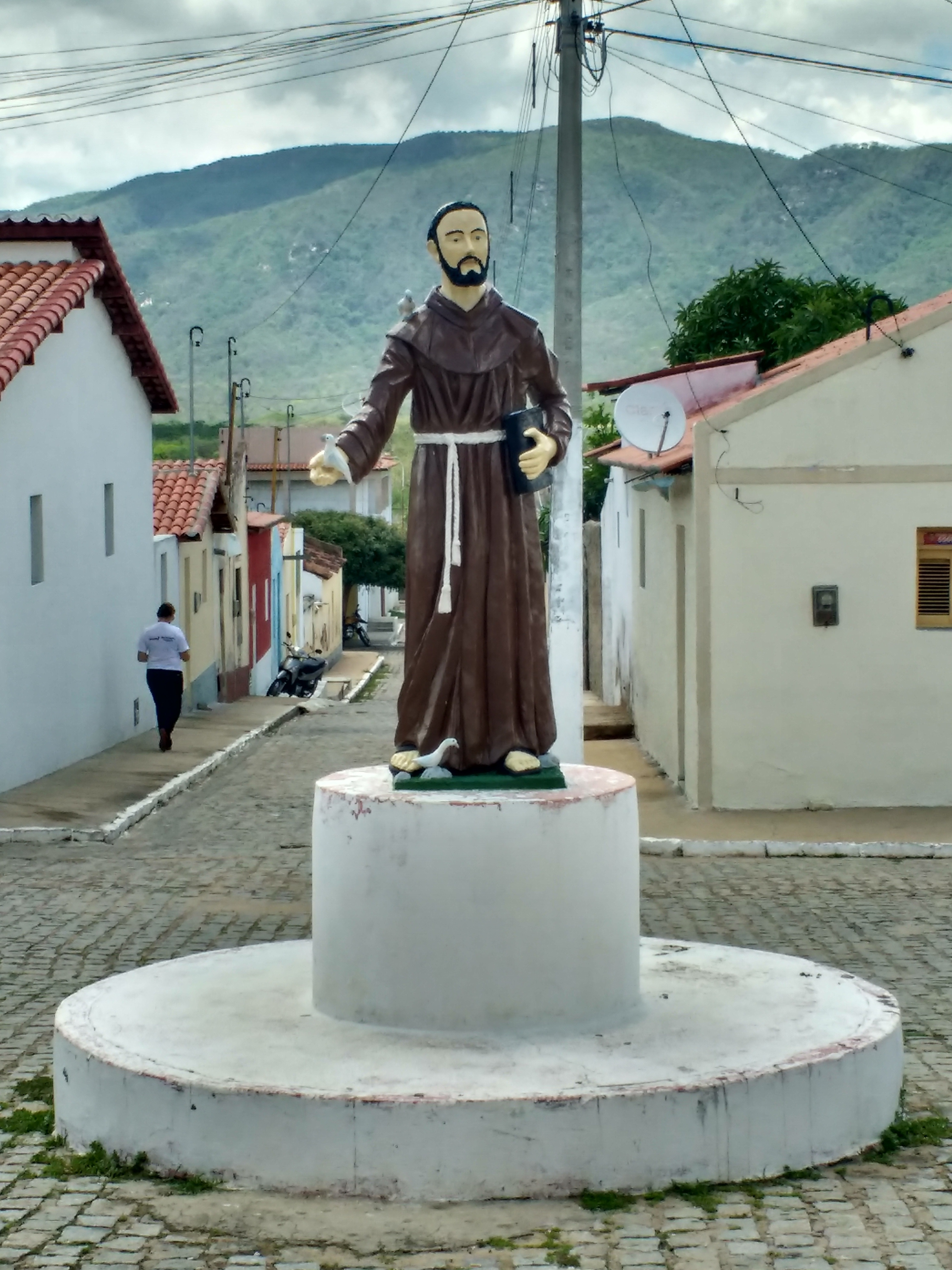 Estátua de São Francisco de Assis, padroeiro de São Francisco do Oeste, Rio Grande do Norte (Brasil).